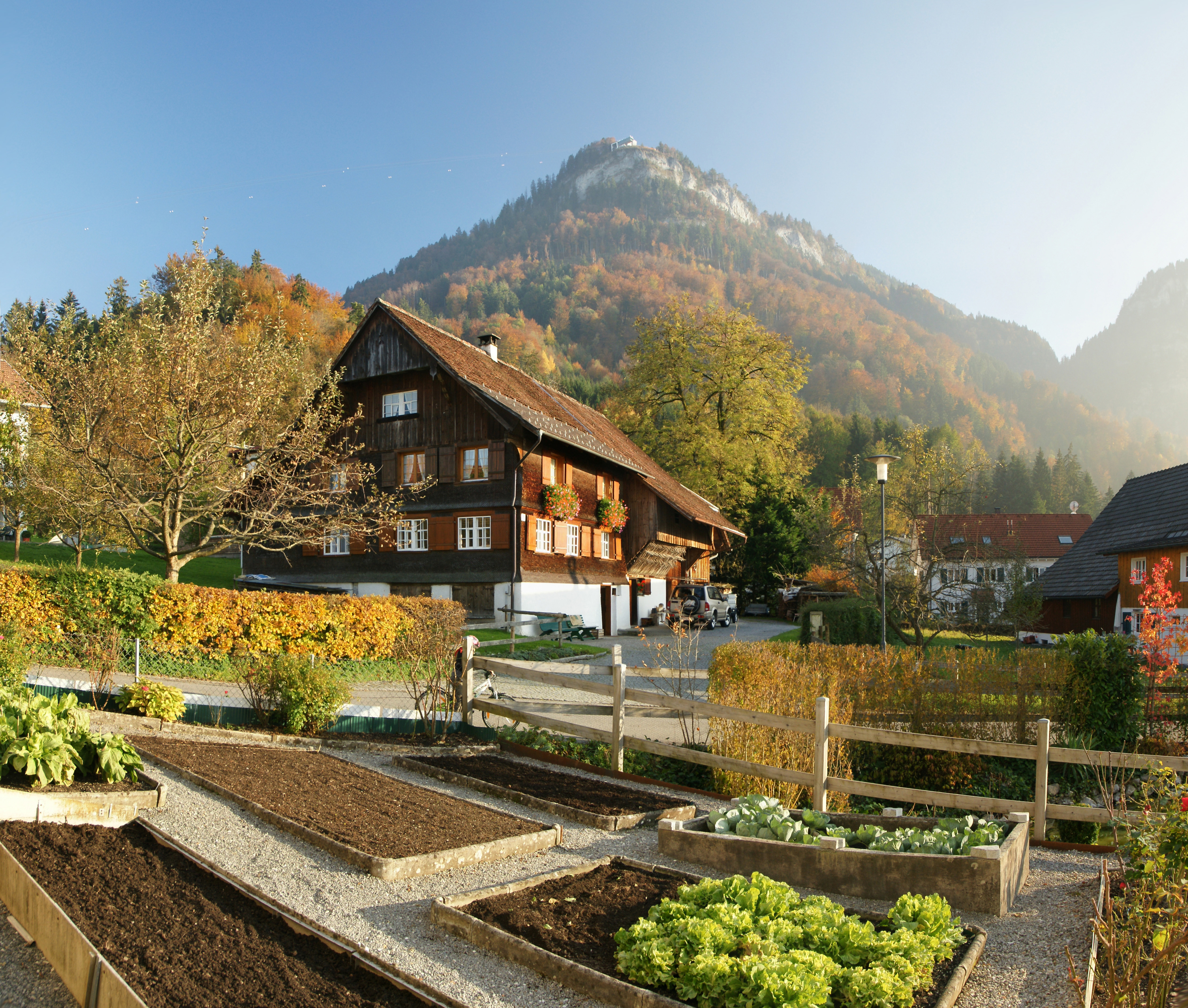 aus dem DEHIO Vorarlberg 1983: KÜFERBACHGASSE; Rheintalhäuser (Nr.2,4) (Klebdächer mit Zahnstäben, ausgeformte Pfettenverschalungen), Nr.6 (im Bild): ausgeformte Pfettenköpfe und Streben. Im Hintergrund der Karrenberg und die Bergstation der Karrenseilbahn.